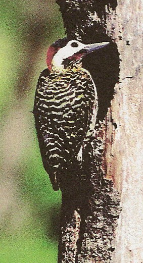 Muestra un pájaro carpintero real de nuca roja en un tronco